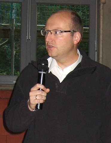 Bürgermeister Michael Esken beim Richtfest des Dorfgemeinschaftshauses Ispei in Hemer.